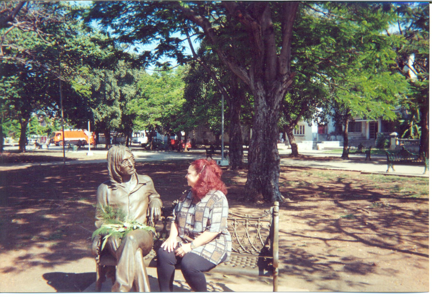 Sonia Silvestre en el parque Lennon en la Habana, año 2000